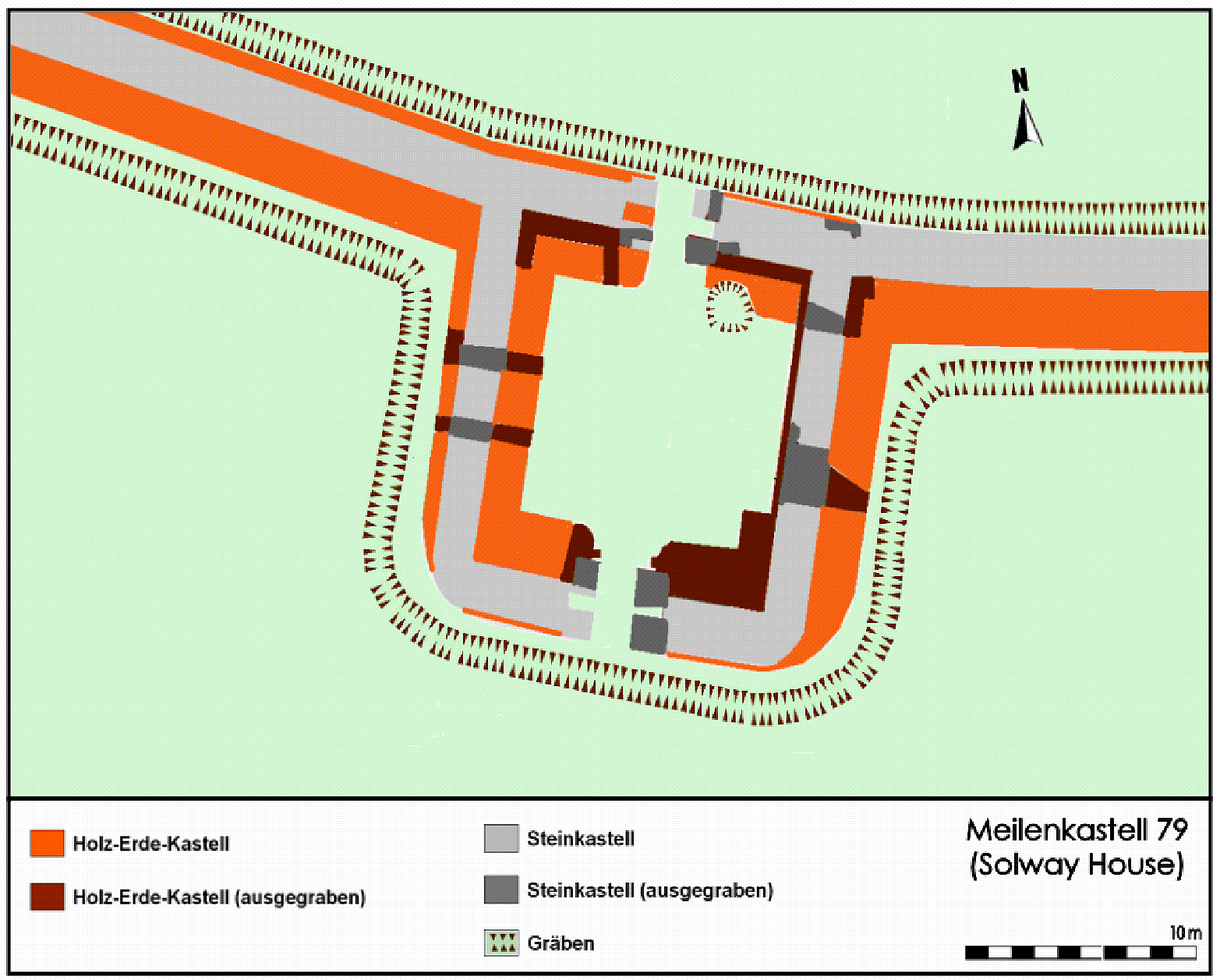 Befundplan des Meilenkastells 79 (Solway House), Hadrianswall, England. Ausgrabungen 1949 - 1999.